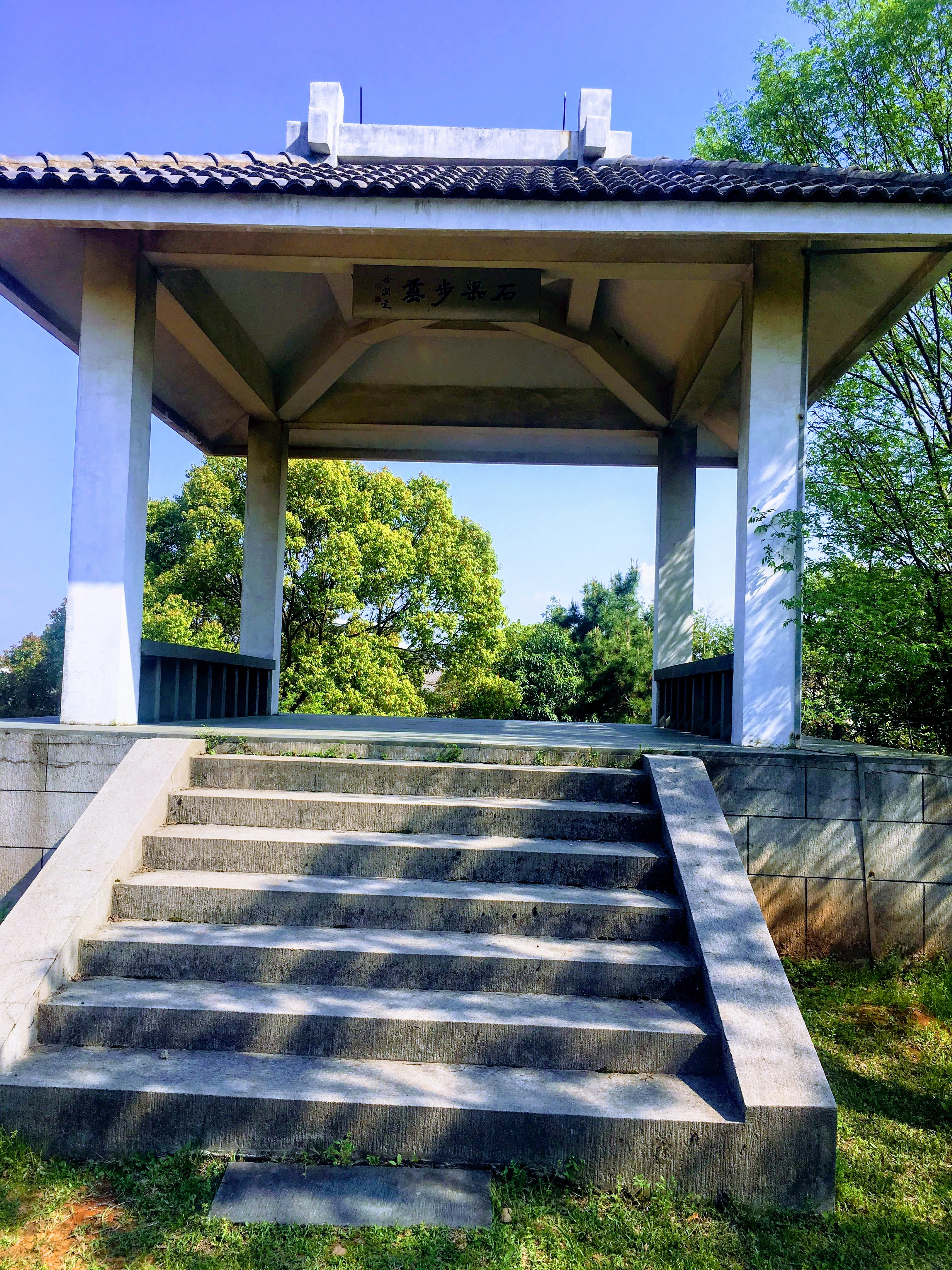 中文（中国大陆）: 这是衢州一中步云亭的风景照